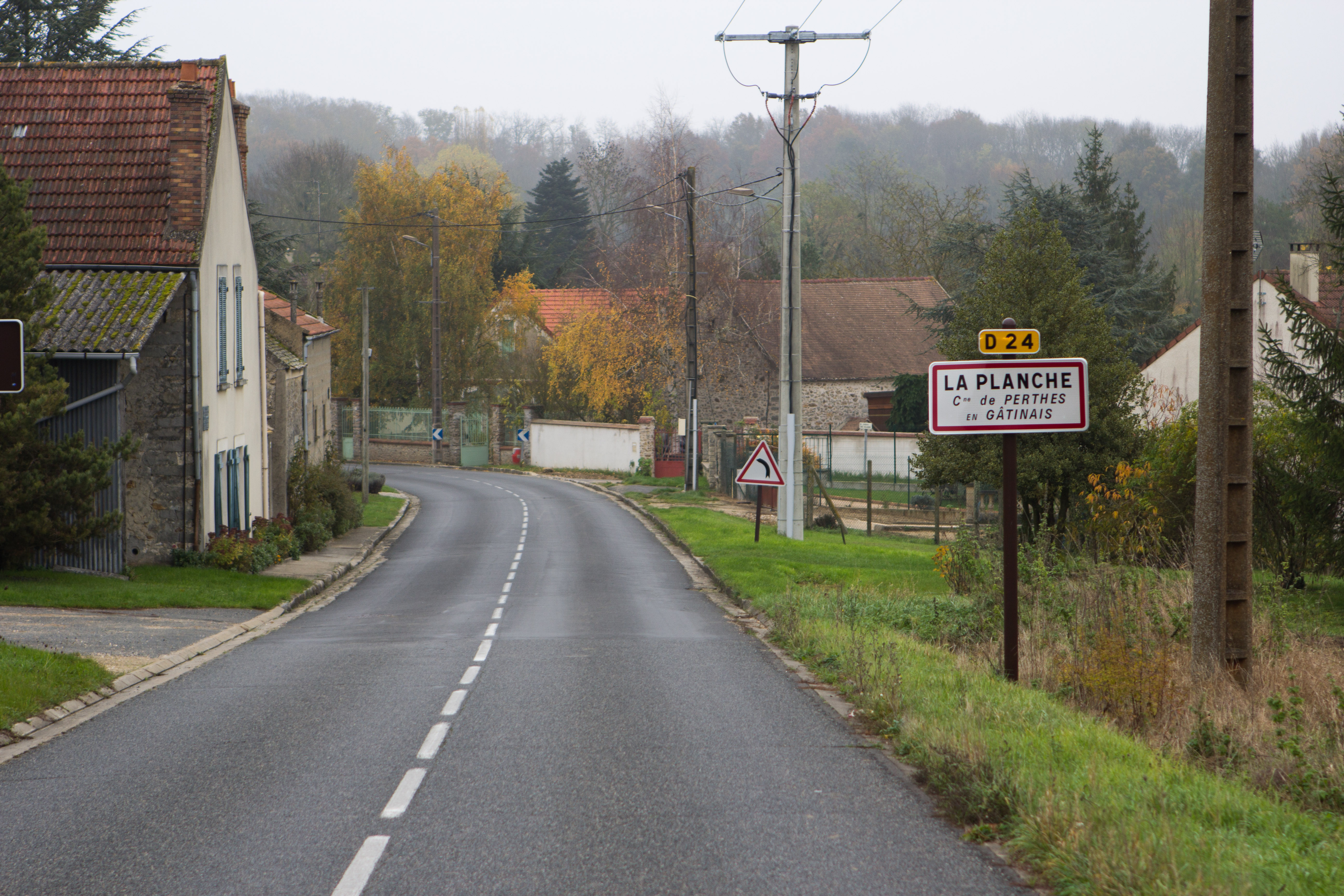 Hameau de la Planche; Perthe-en-Gâtinais,; Perthes, Seine-et-Marne, France.